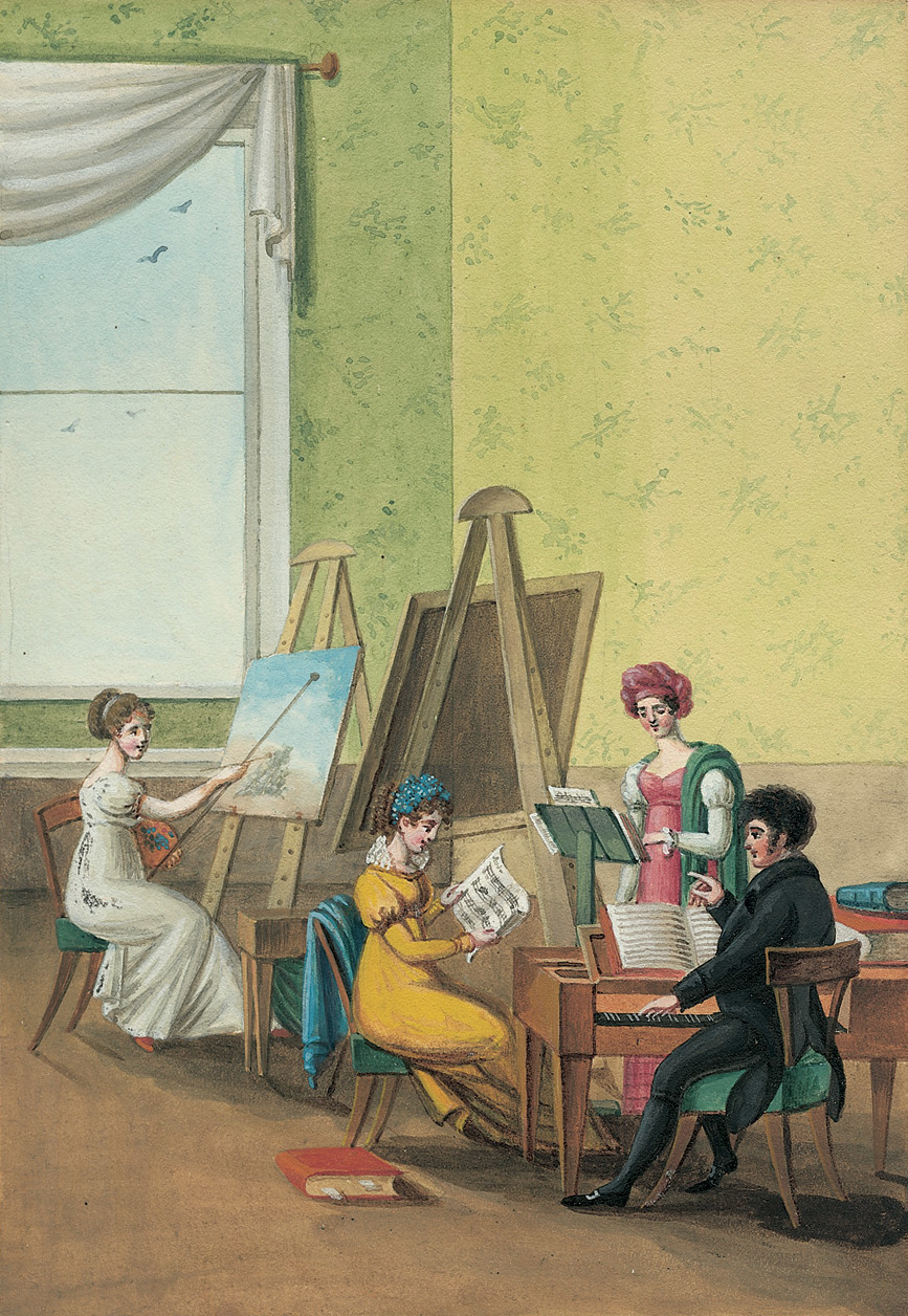 Die Ausübung der schönen Künste: Junge Malerin an der Staffelei einer Musikstunde beiwohnend. Aquarell und Deckfarben. 16,3 x 11,4 cm. Deutsch um 1800.